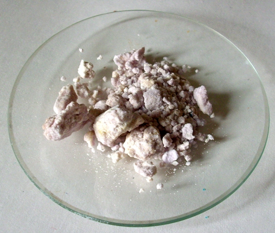 Fe2(SO4)3